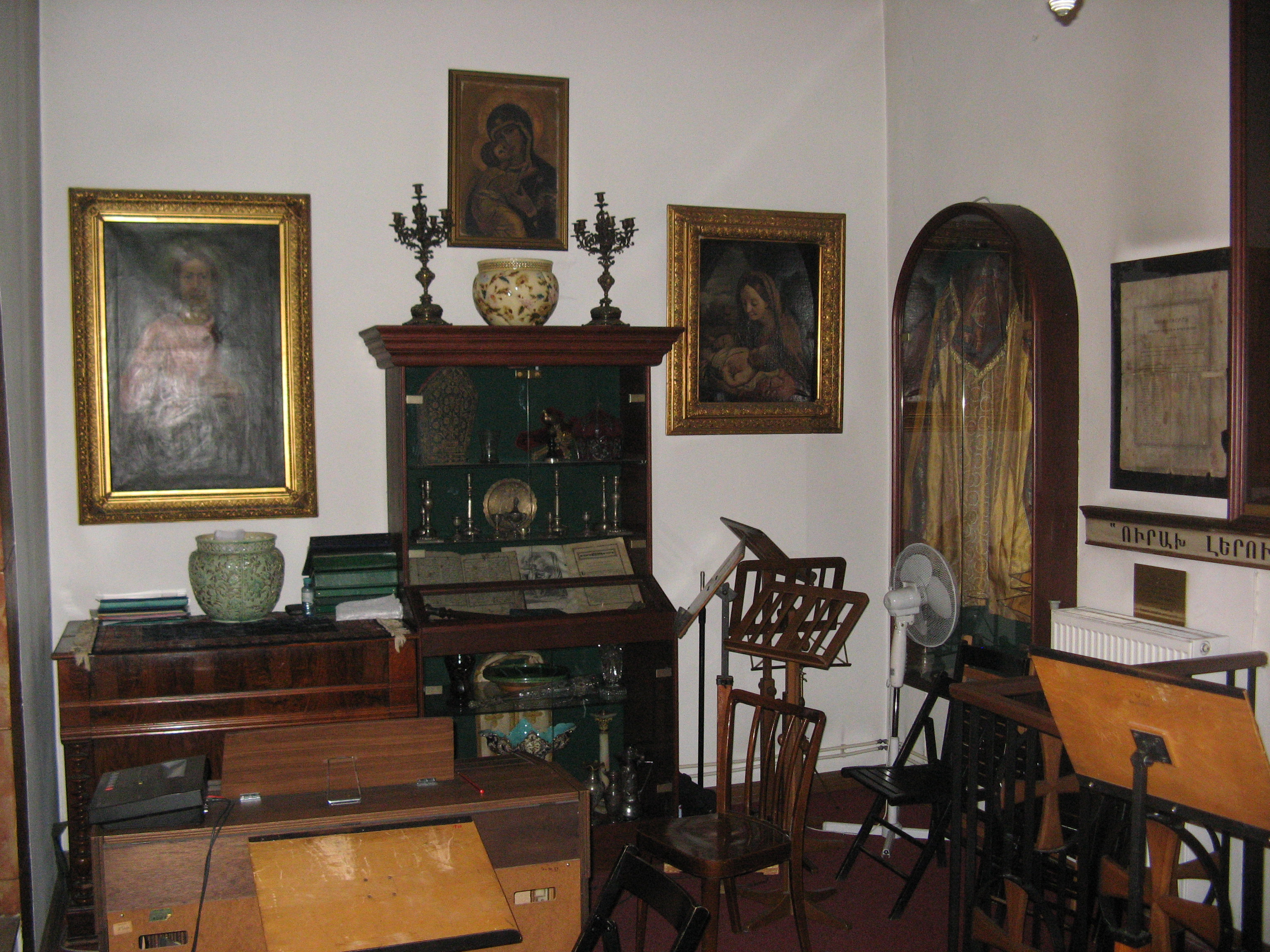 Gegenstände aus der alten Kirche auf der Empore, Armenische Kirche St. Hripsime, Kolonitzgasse 11, Wien-Landstraße